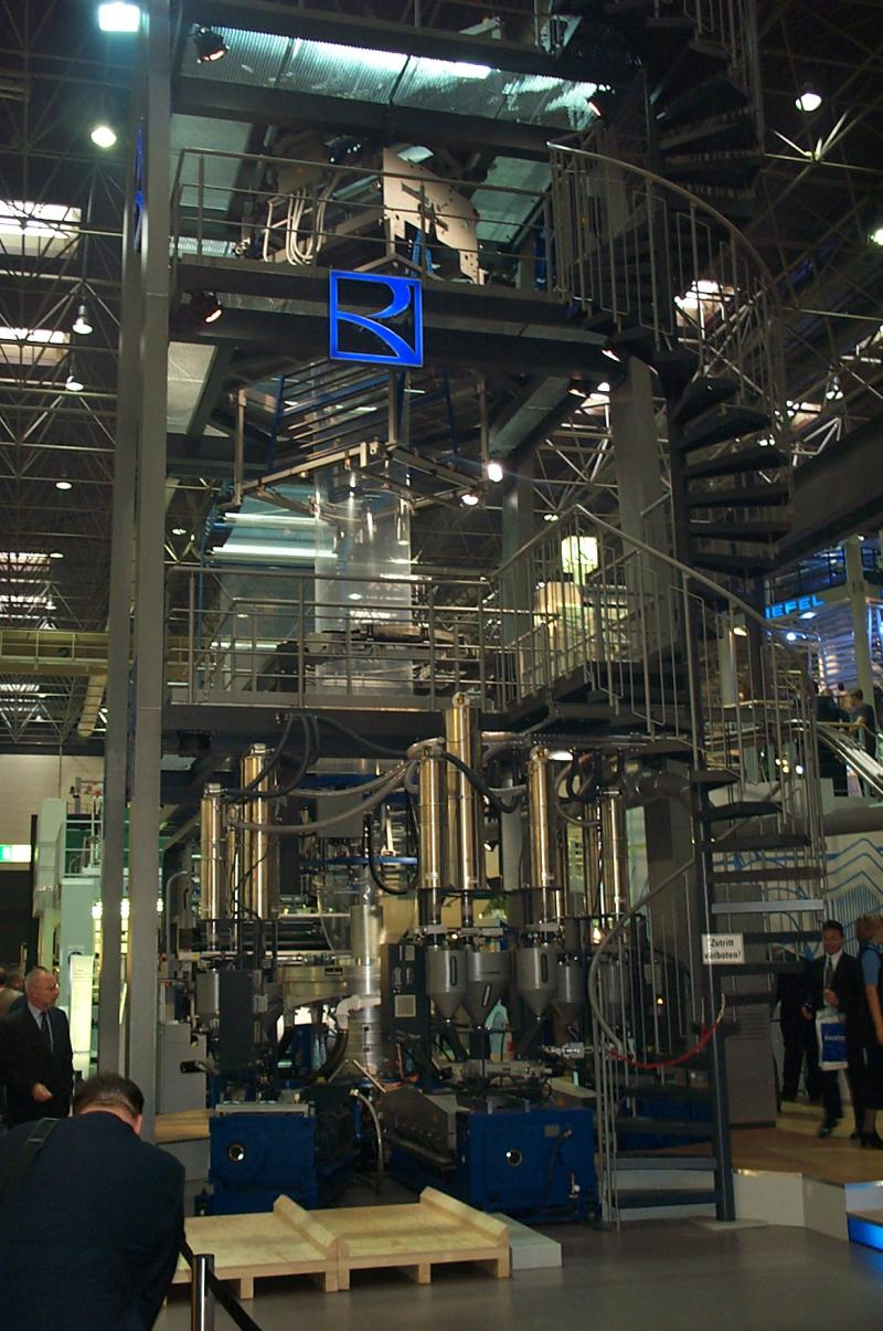 Gesamtansicht einer Schlauchfolienanlage der Firma Reifenhäuser. Fotografiert auf der Kunststoffmesse K'01 in Düsseldorf 2001.